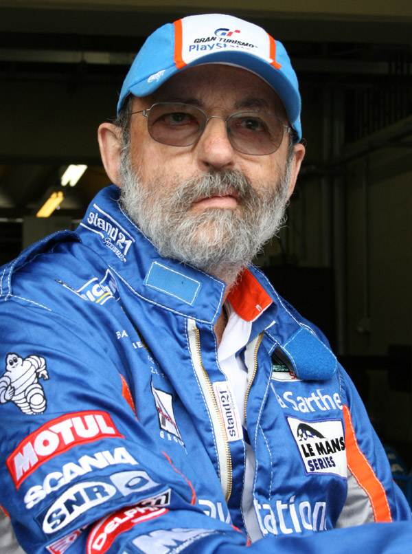 Le Mans Series 2007 Rd.6 Mil Milhas Brasil: Henri Pescarolo (Pescarolo Sport)